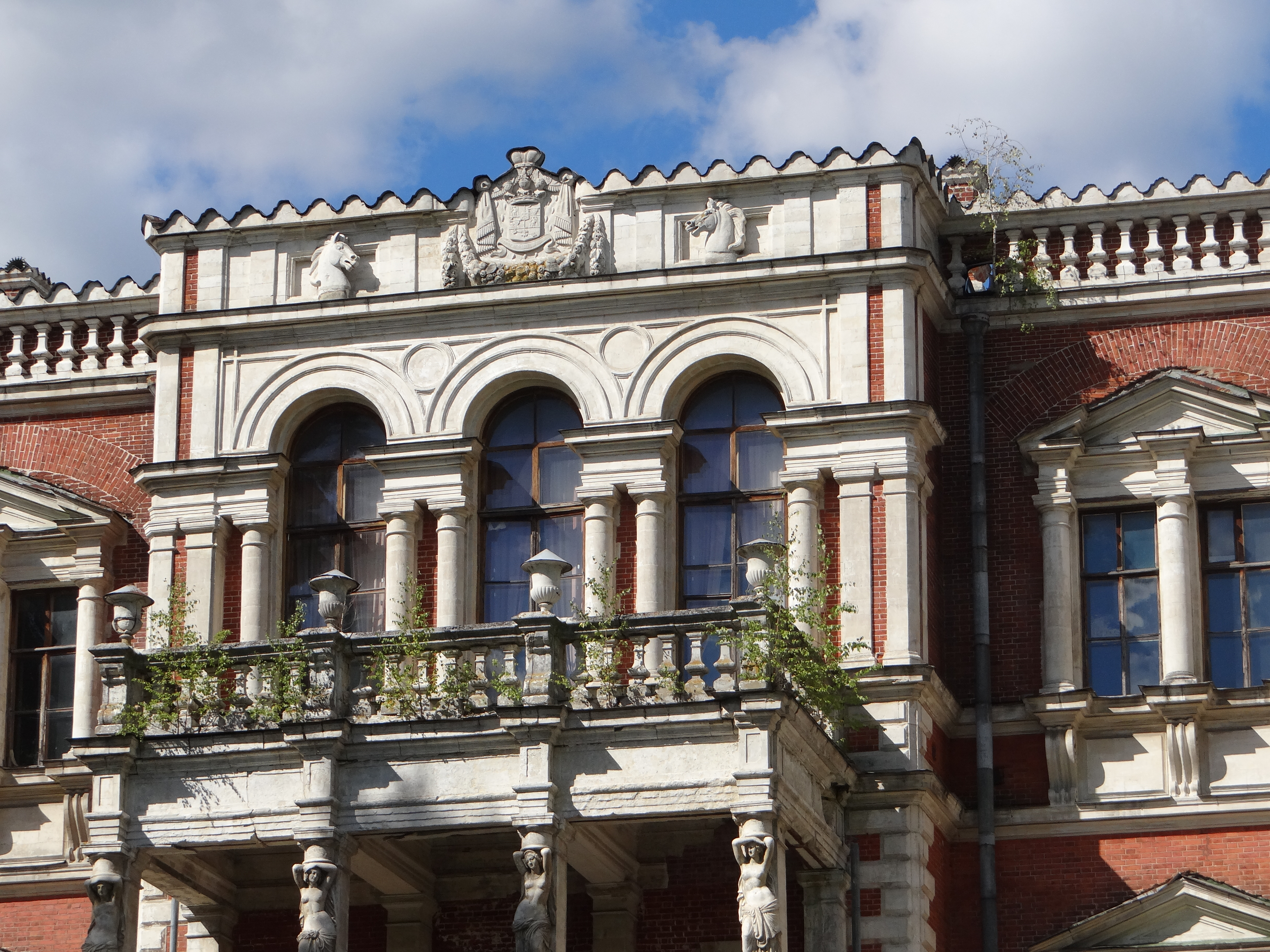 Усадьба М. М. Измайлова «Быково»: Быково (к югу от аэропорта), Раменский район, Московская область